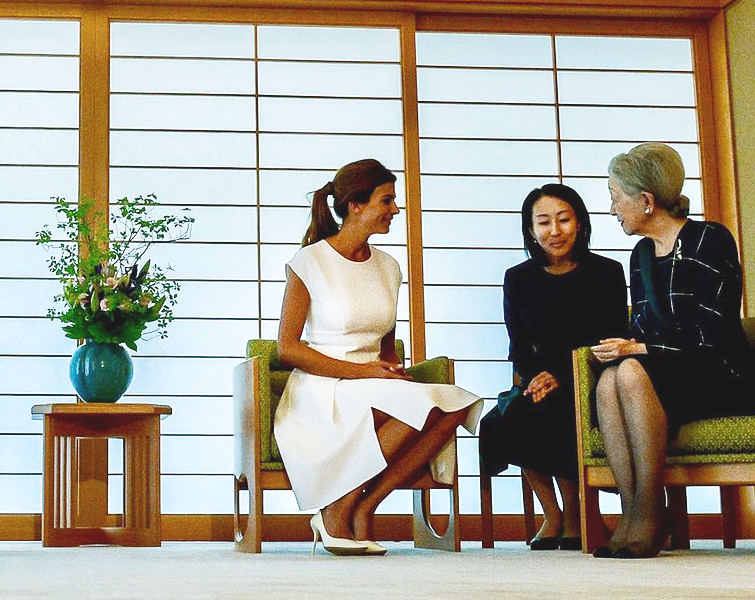 Mauricio Macri y Juliana Awada junto al Emperador del Japón Akihito y la Emperatriz Michiko